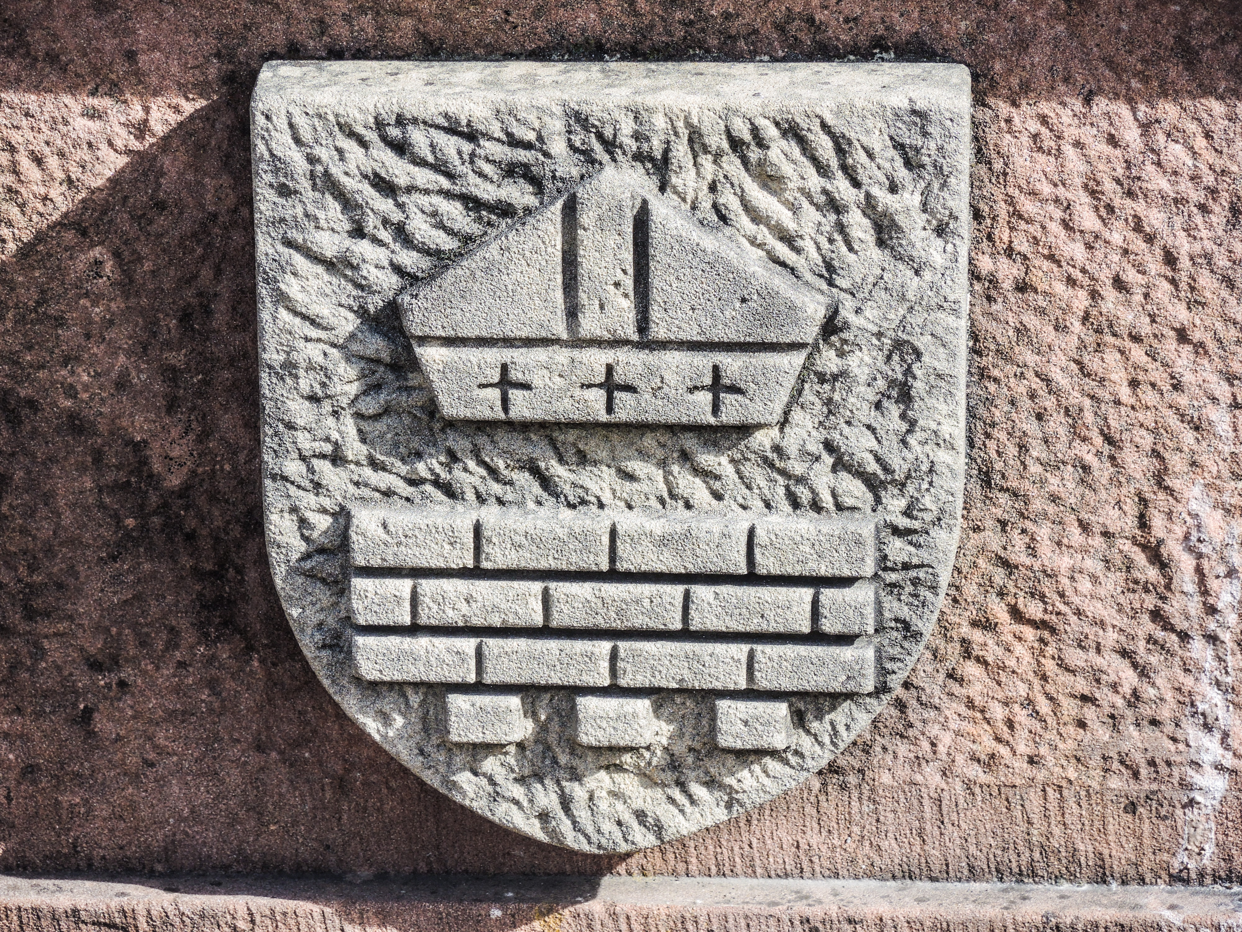 Ecusson du village, sur la fontaine devant la mairie. Saint-Germain-le-Châtelet. Territoire de Belfort.